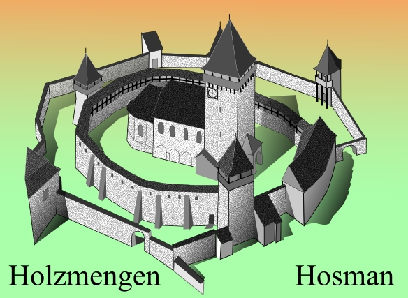 Biserica fortificata din Hosman